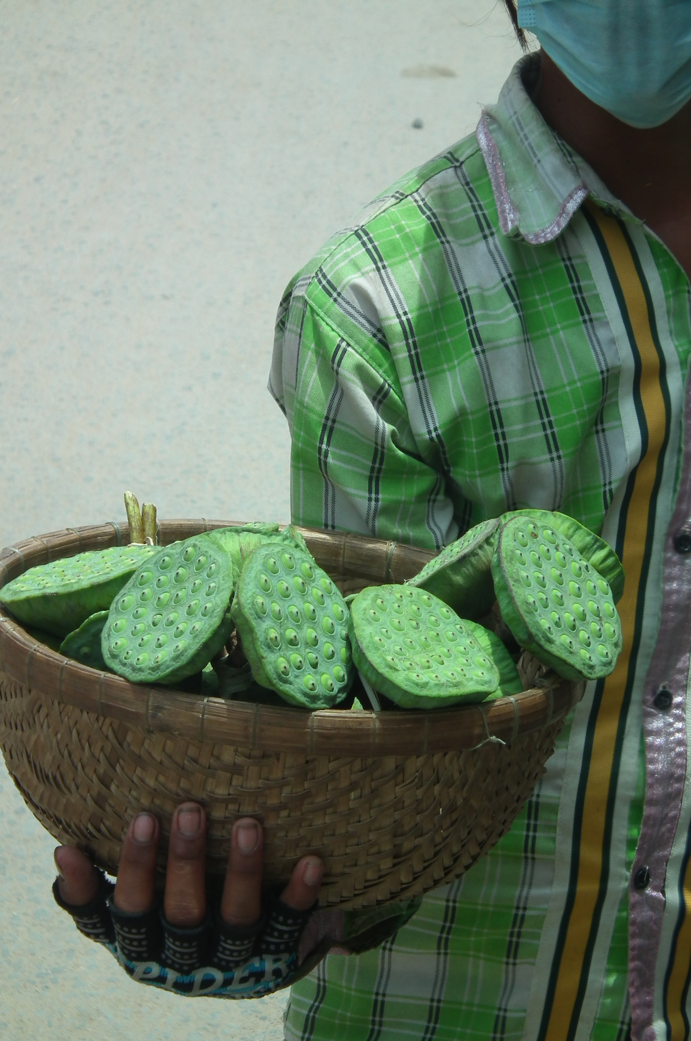 Nelumbo nucifera ハスの実を売る少年